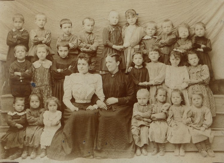 Marie Pape-Carpantier vers 1872, entourée d'une classe enfantine et en compagnie d'une de ses filles (sans doute Madeleine ?). Photo anonyme, 23 x 16 cm. Au verso cachet Collection Fougeron. Inédite, collection privée S.C.